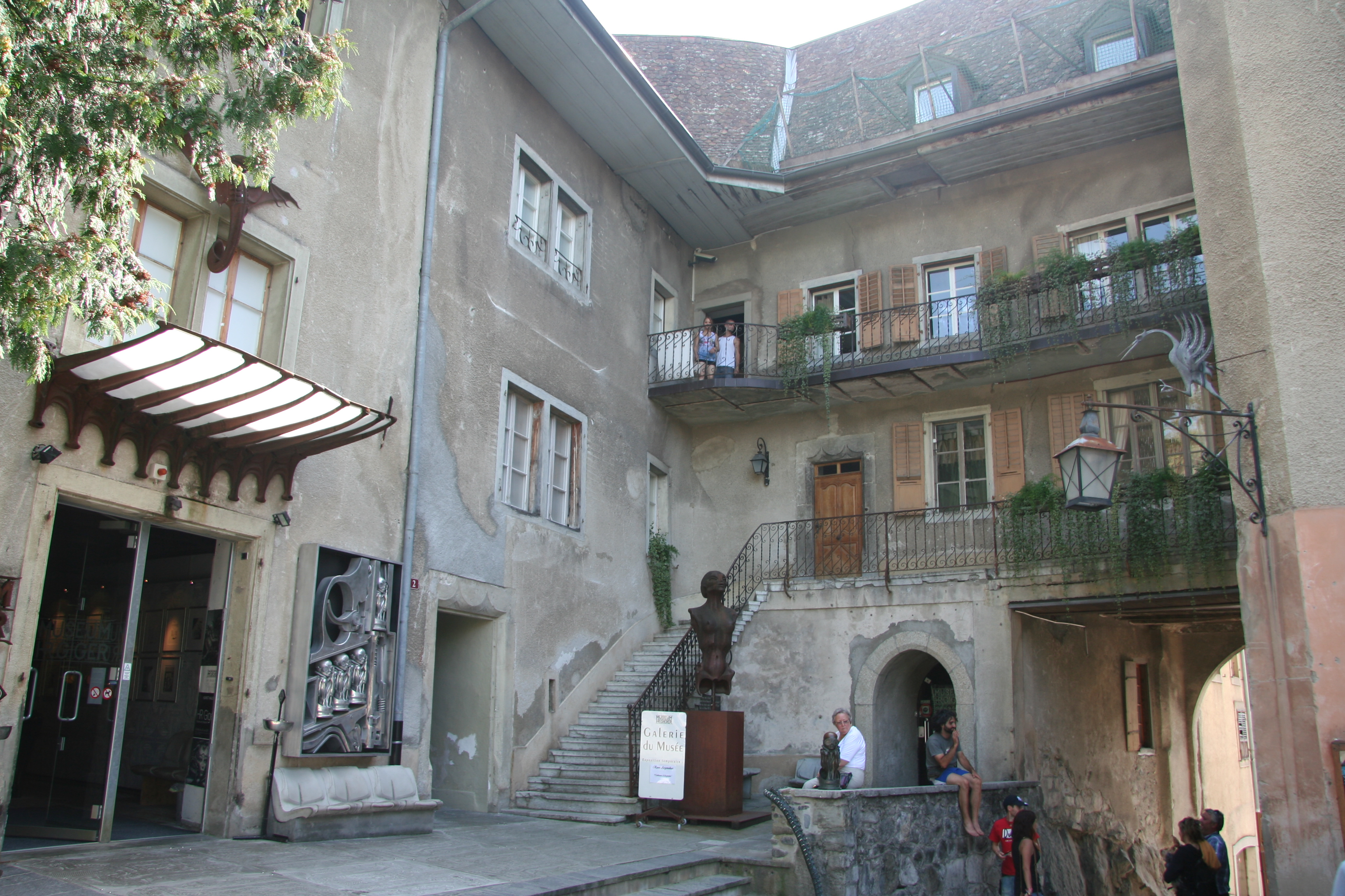 Fribourg - Gruyères - Château Saint-Germain